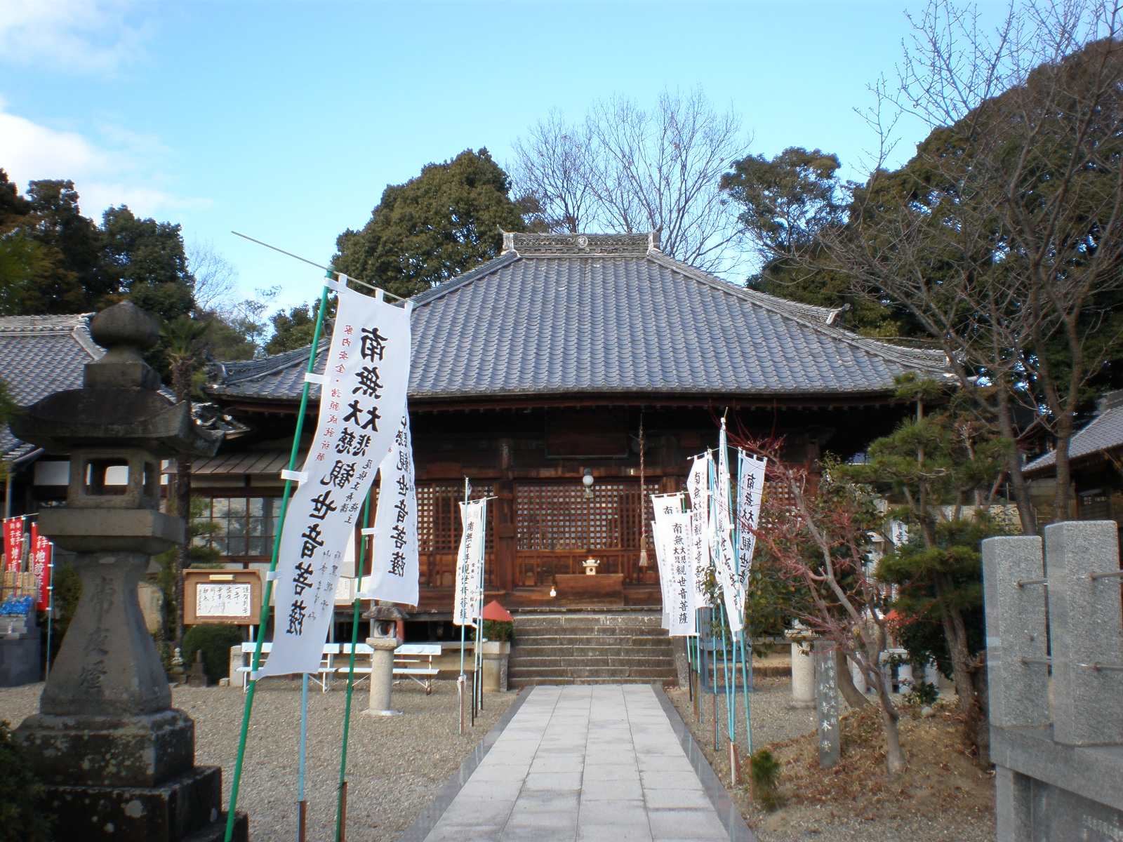 愛知県小牧市にある小松寺の本堂